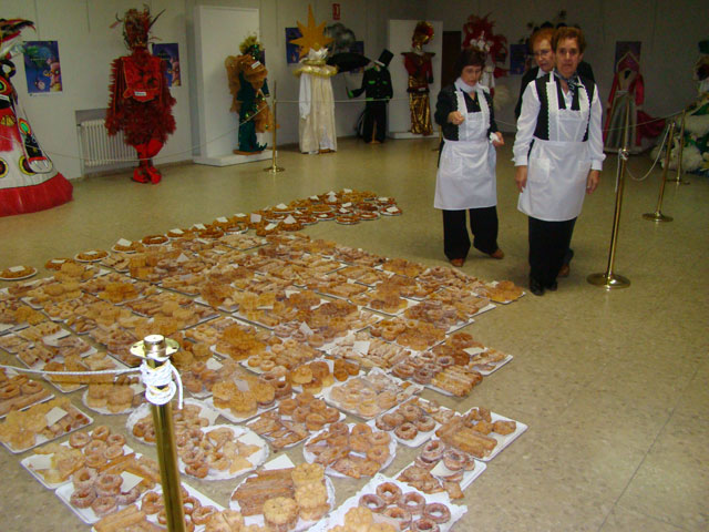 concurso de fruta en sarten en carnavales .lunes de carnaval.